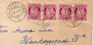 Brev med poststempel Kalandseidet.